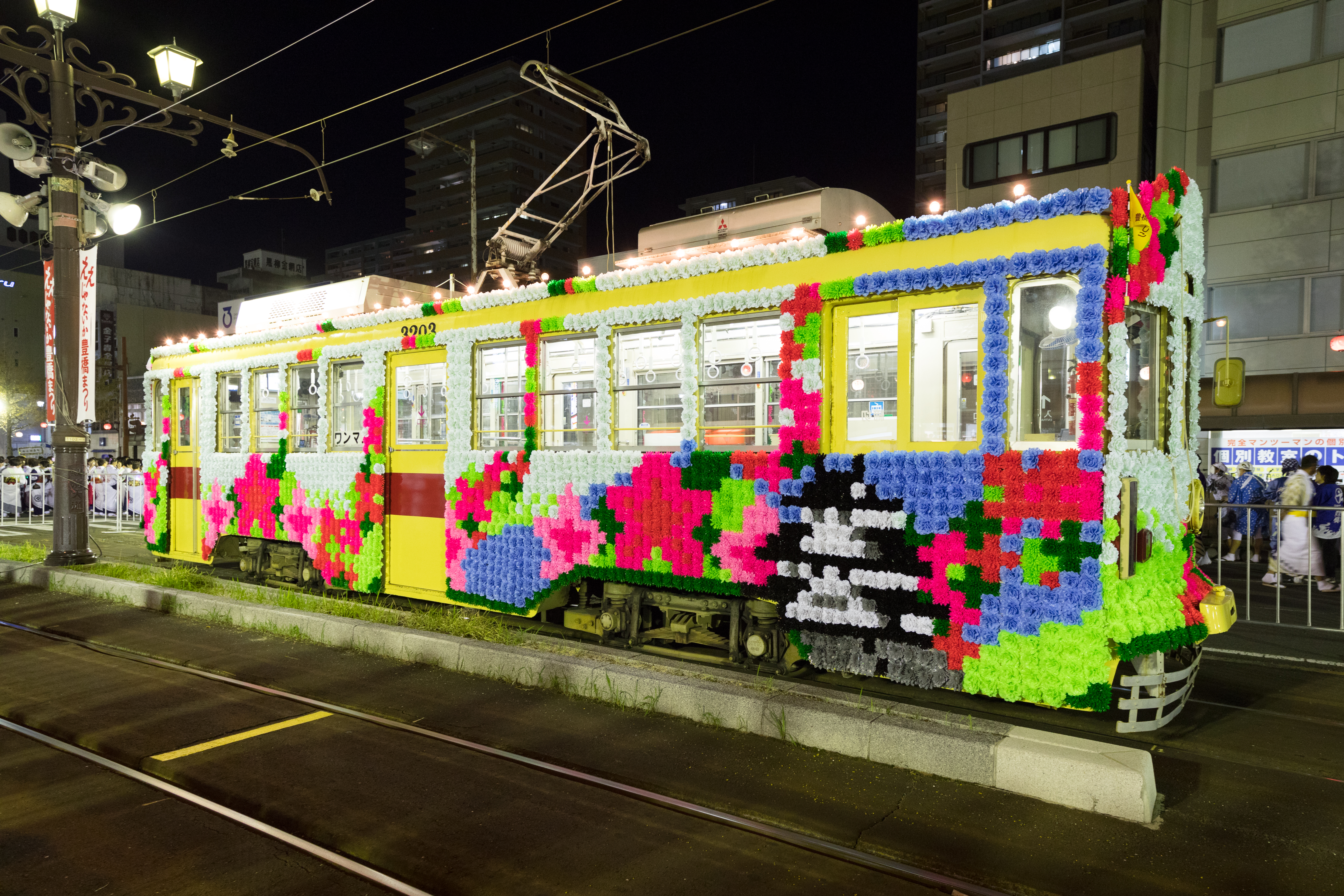 豊橋まつりにて展示されていた花電車